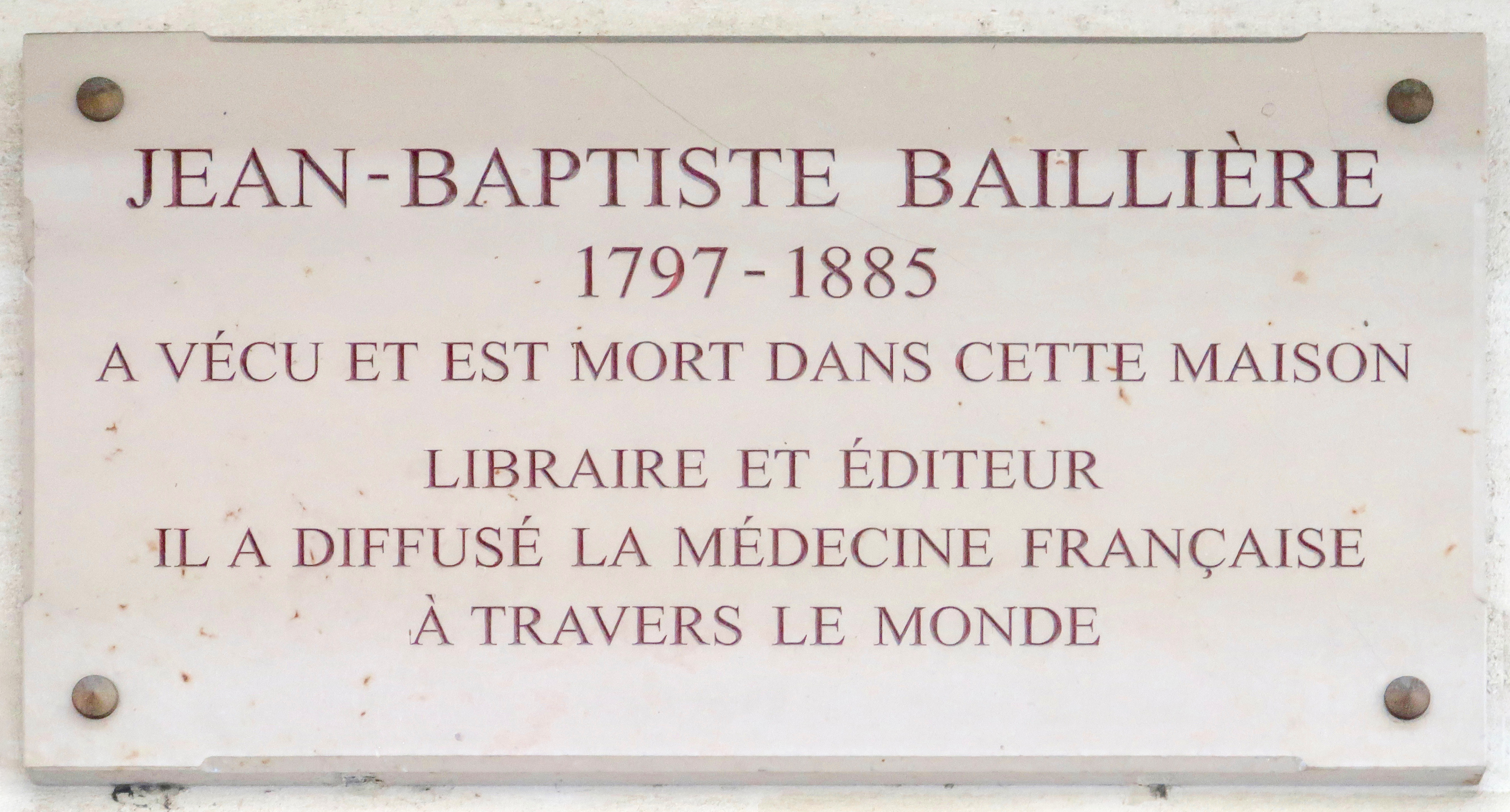 Plaque Jean-Baptiste Baillière, 19 rue Hautefeuille (Paris, 6e).